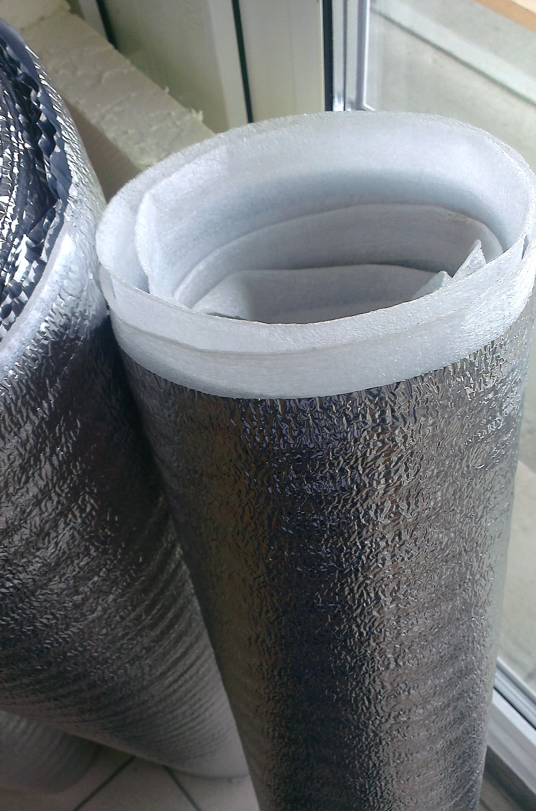 Рулон фольгированного вспененного полиэтилена. Используется в качестве теплоизоляции. Автор: VadimSB Источник: Собственная работа